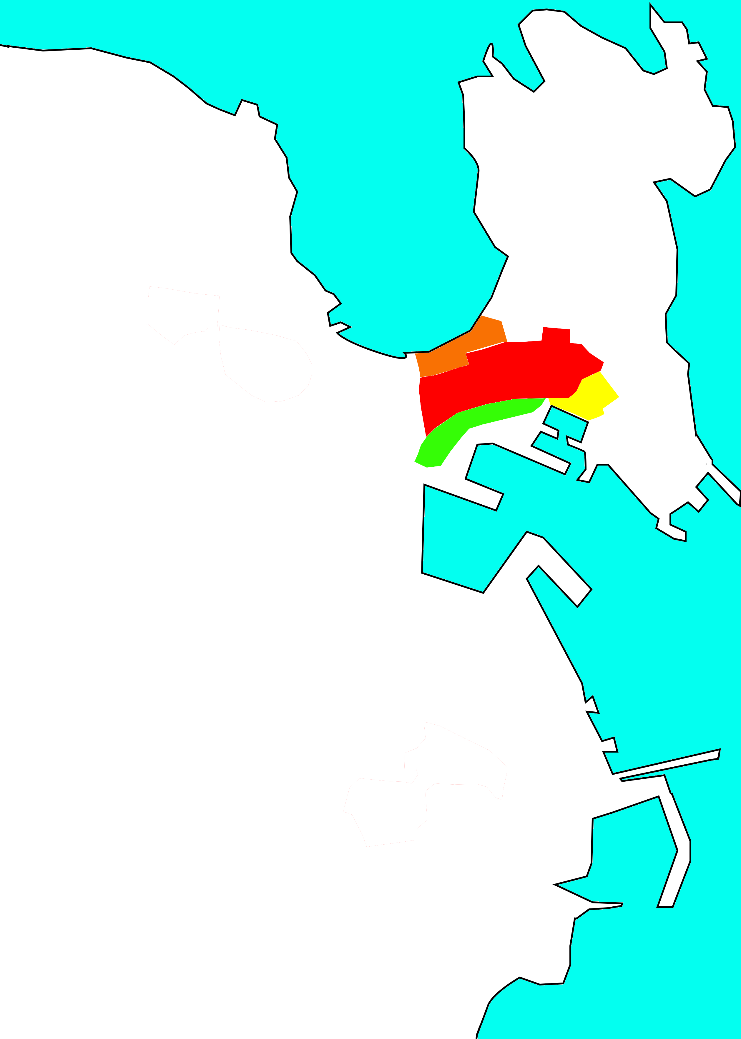 Situación da Peixaría (vermello) no concello da Coruña, segundo En amarelo María Pita, en laranxa O Orzán e en verde os xardíns do Recheo.